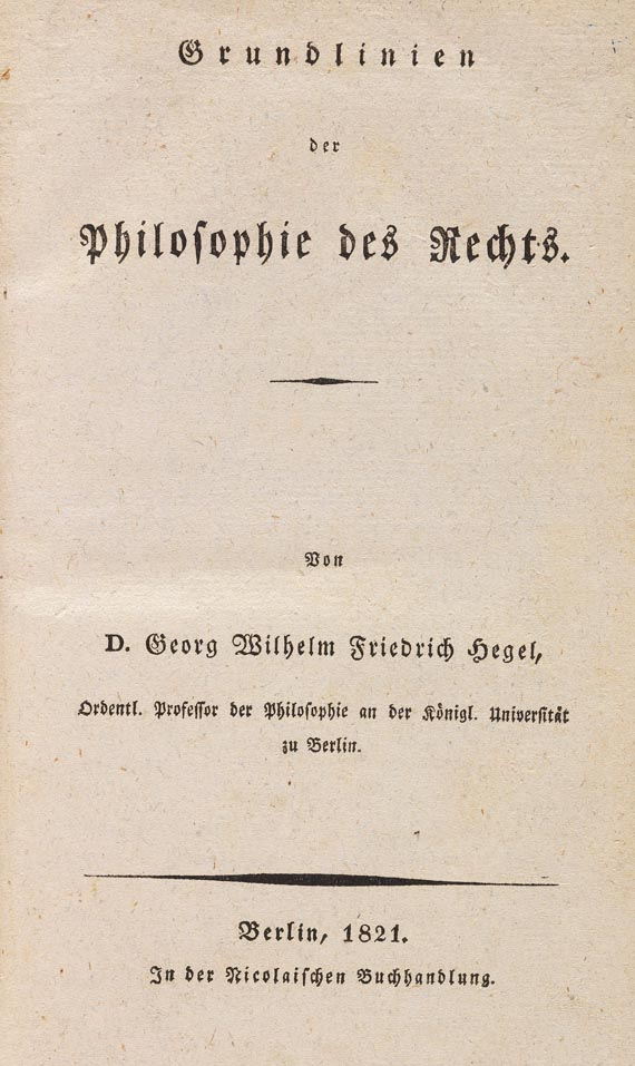 Grundlinien der Philosophie des Rechts